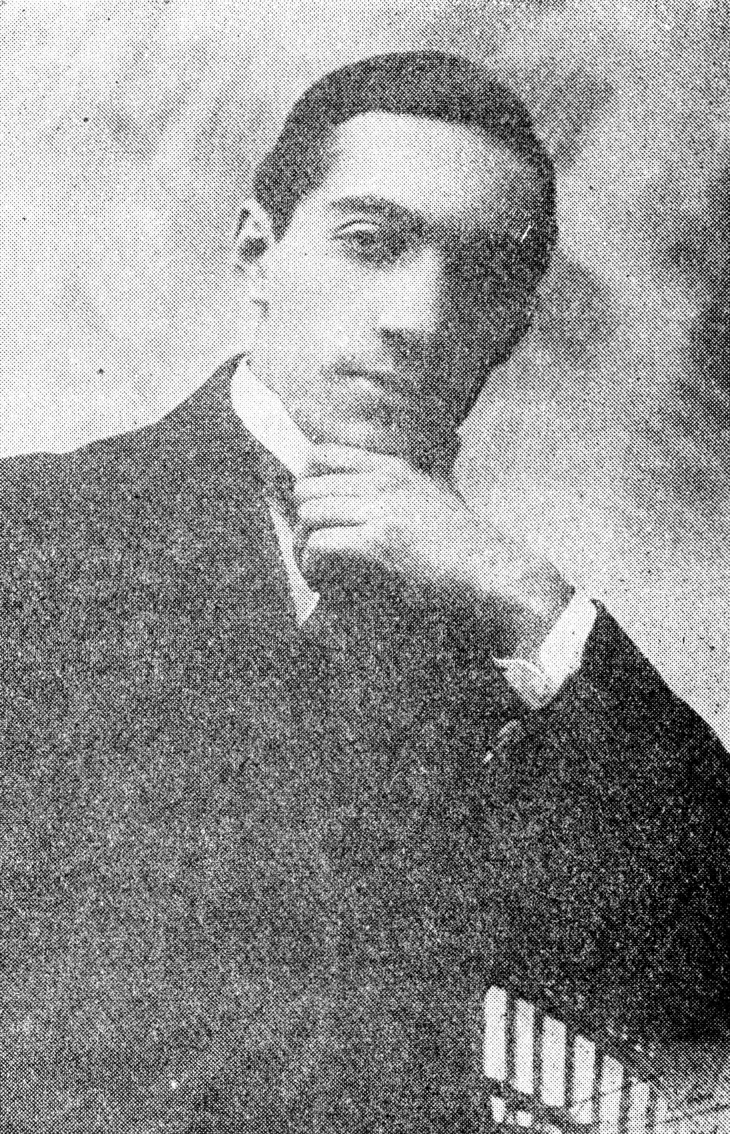 Andrzej Włast